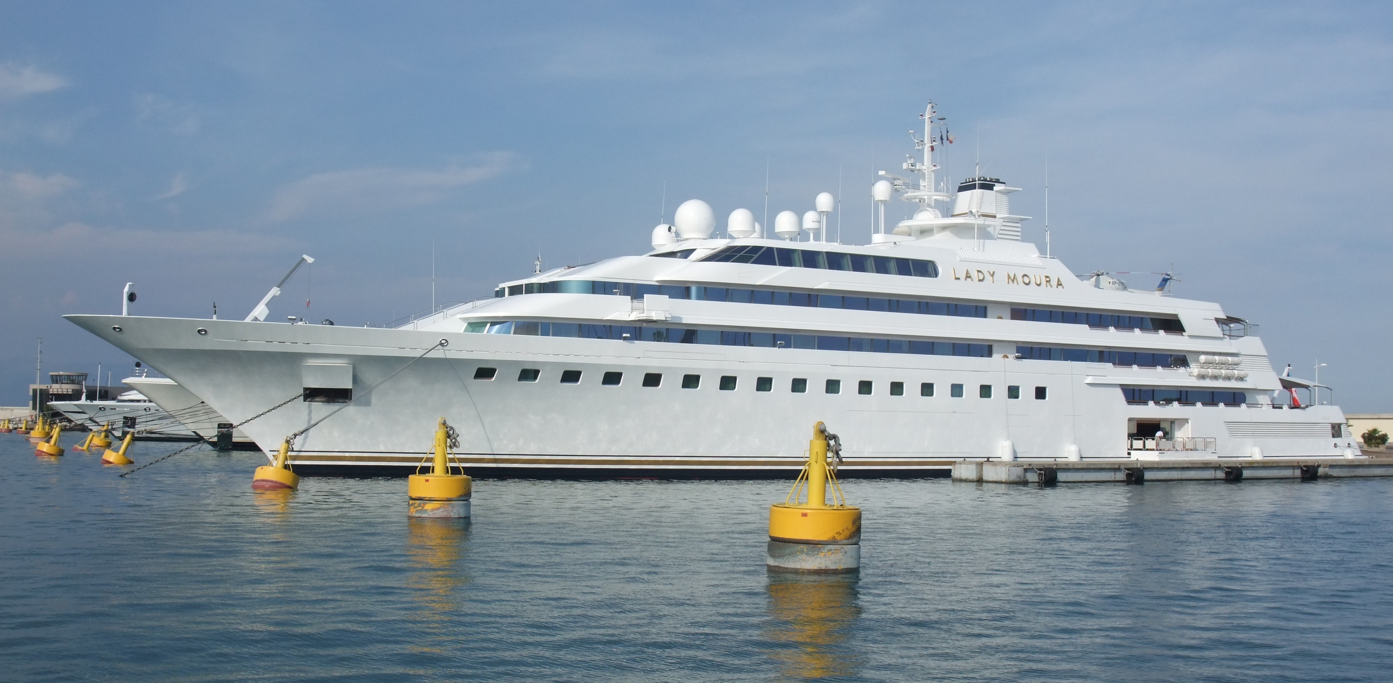 Le yacht Lady Moura au port d'Antibes (France) lors de l'été 2009. Le Lady Moura mesure 105 mètres de long et a été construit en 1990 par l'entreprise allemande Blohm & Voss.